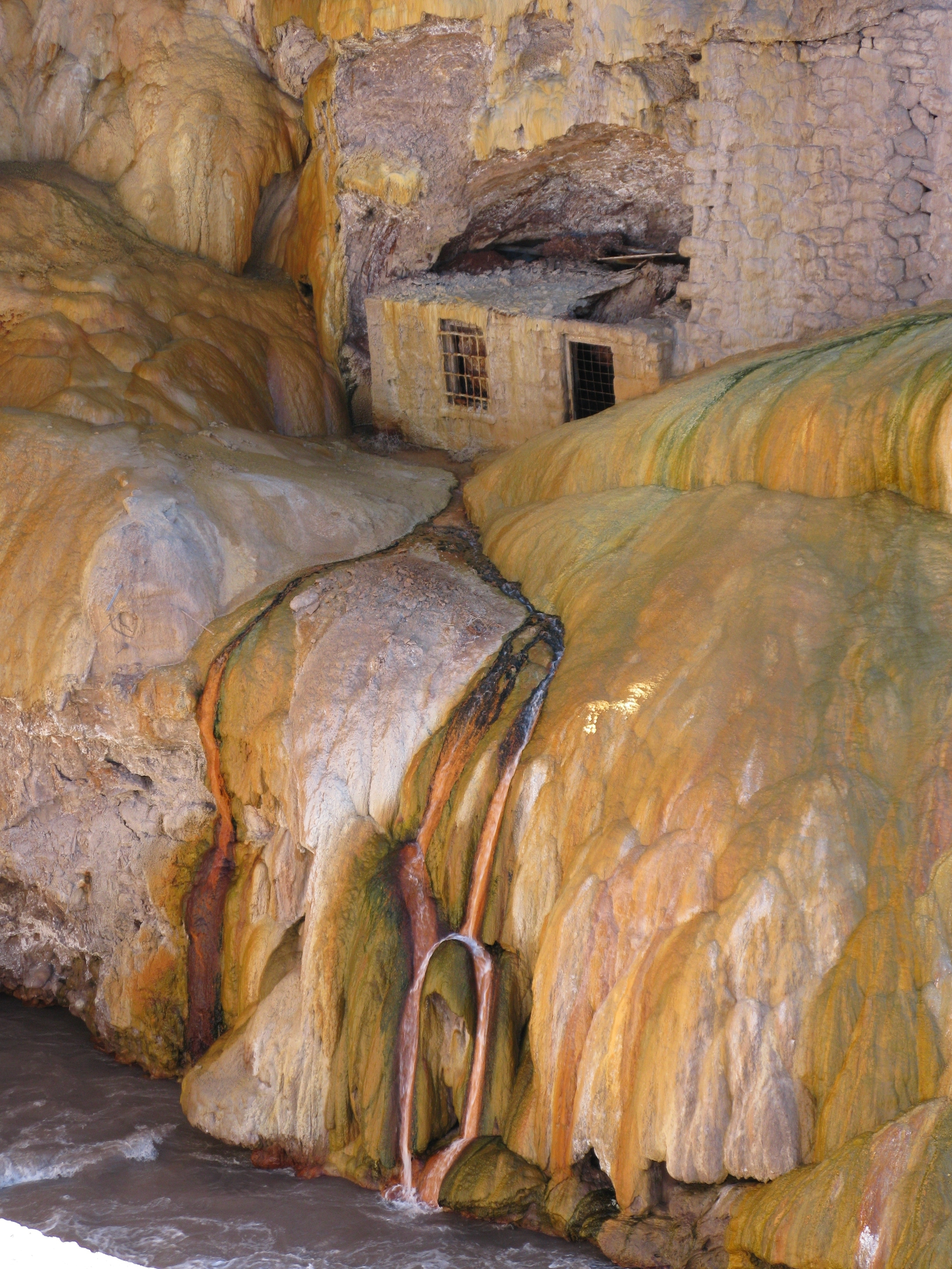 Puente del Inca, es una formacion natural en forma de puete sobre el rio Vacas, un afluente del rio Mendoza. Esta ubicado en la provincia de Mendoza , Argentina cerca de Las Cuevas, camino a Chile.